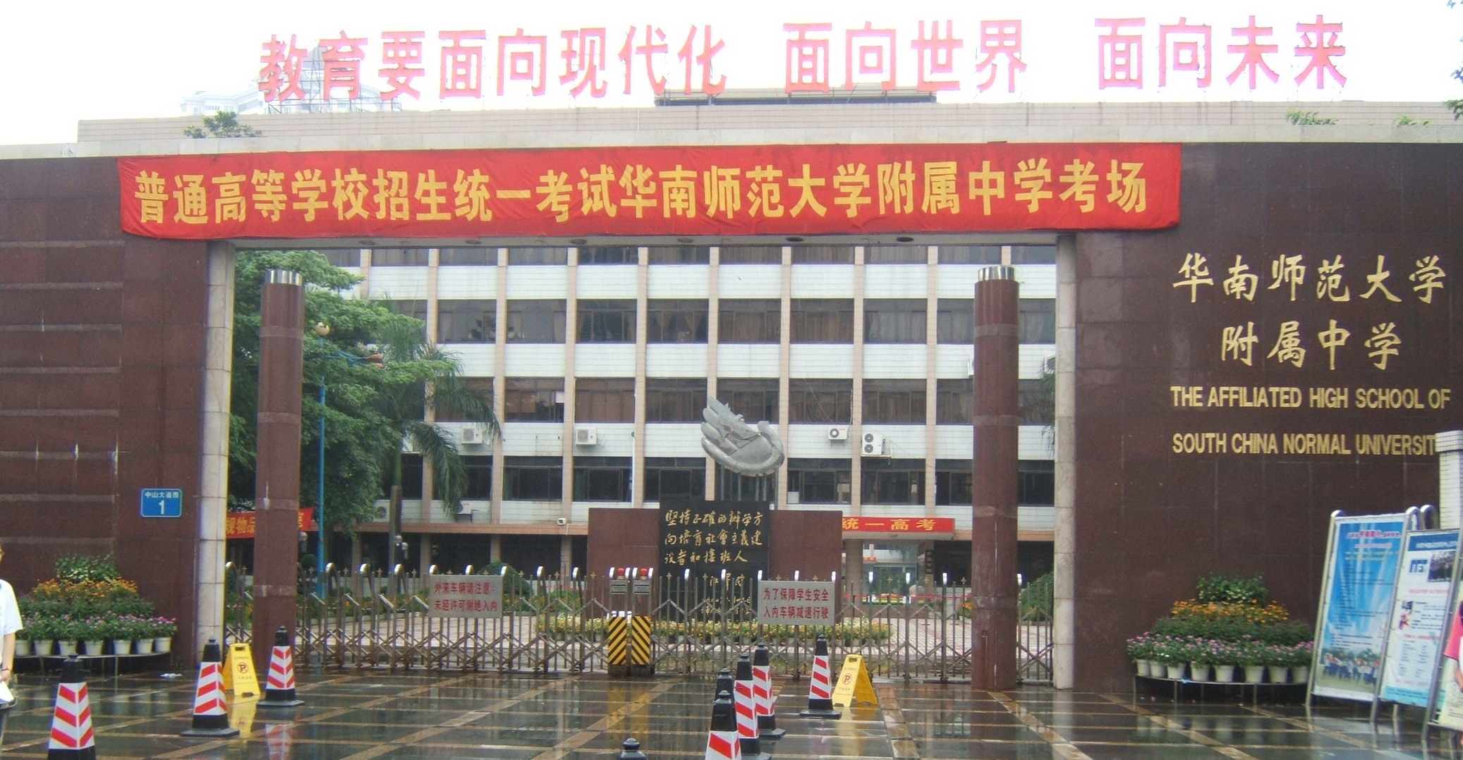 华南师大附中正门